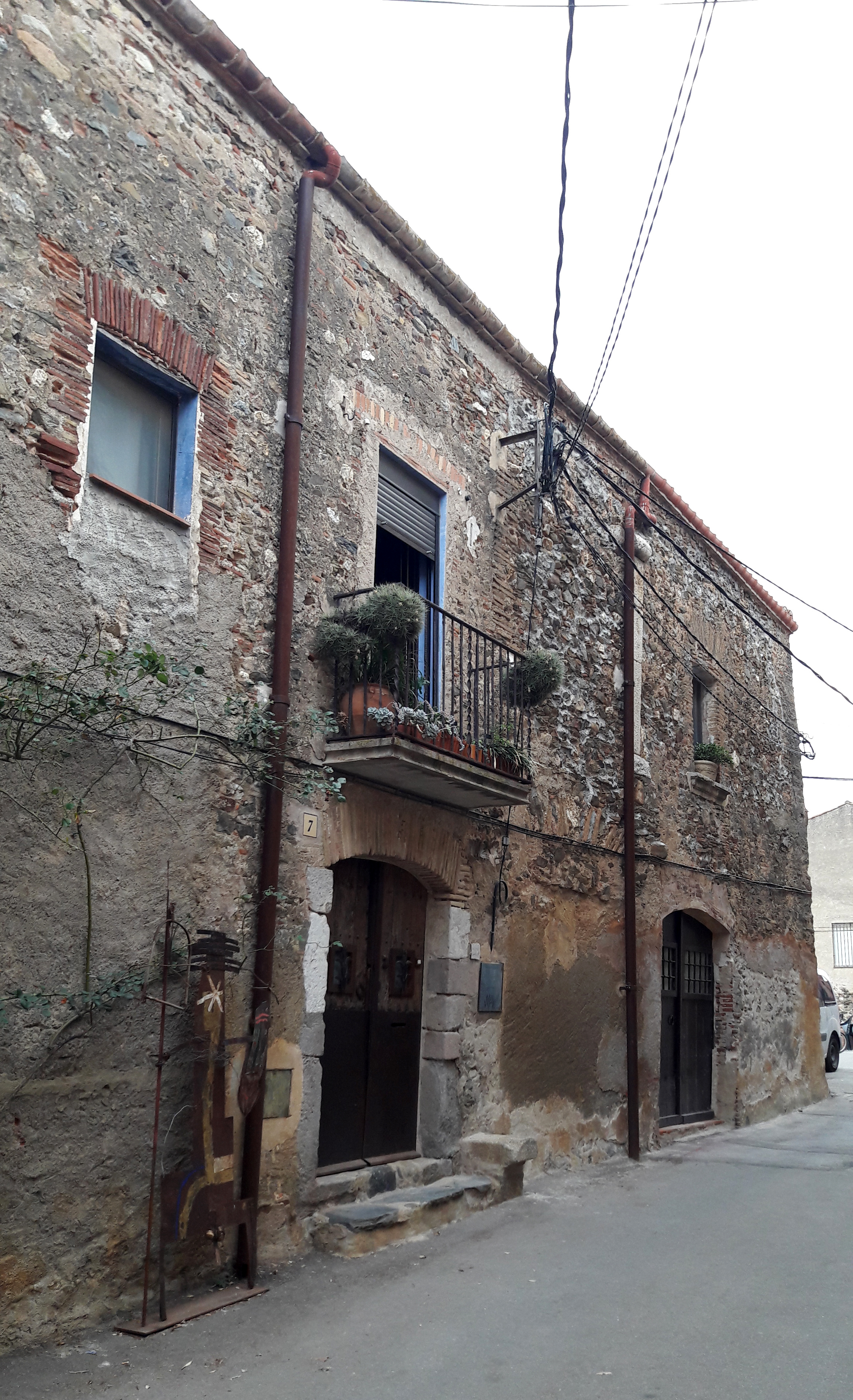 Casa al carrer Principal, 7 (Garriguella)